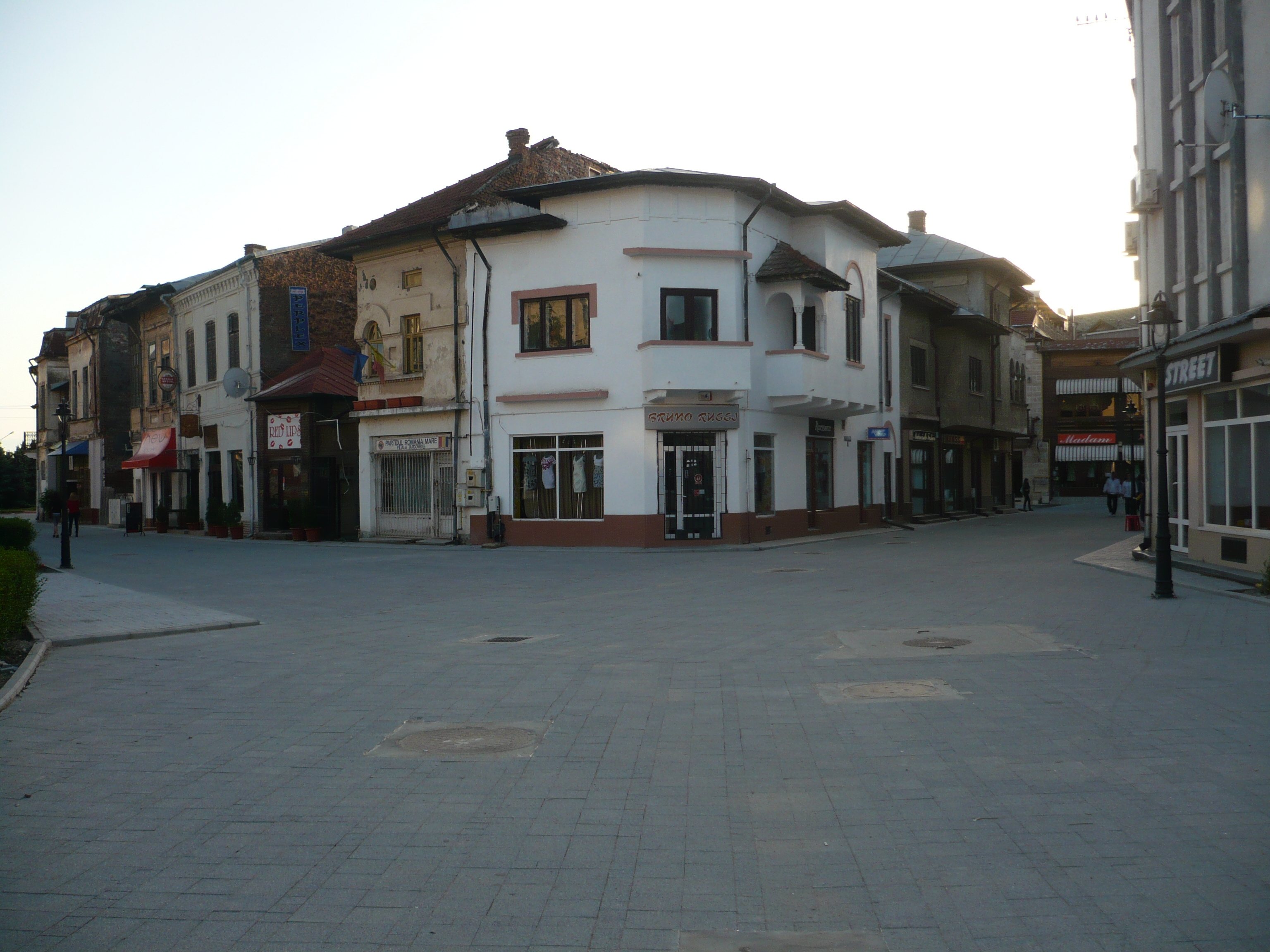 Centrul Vechi Târgoviște